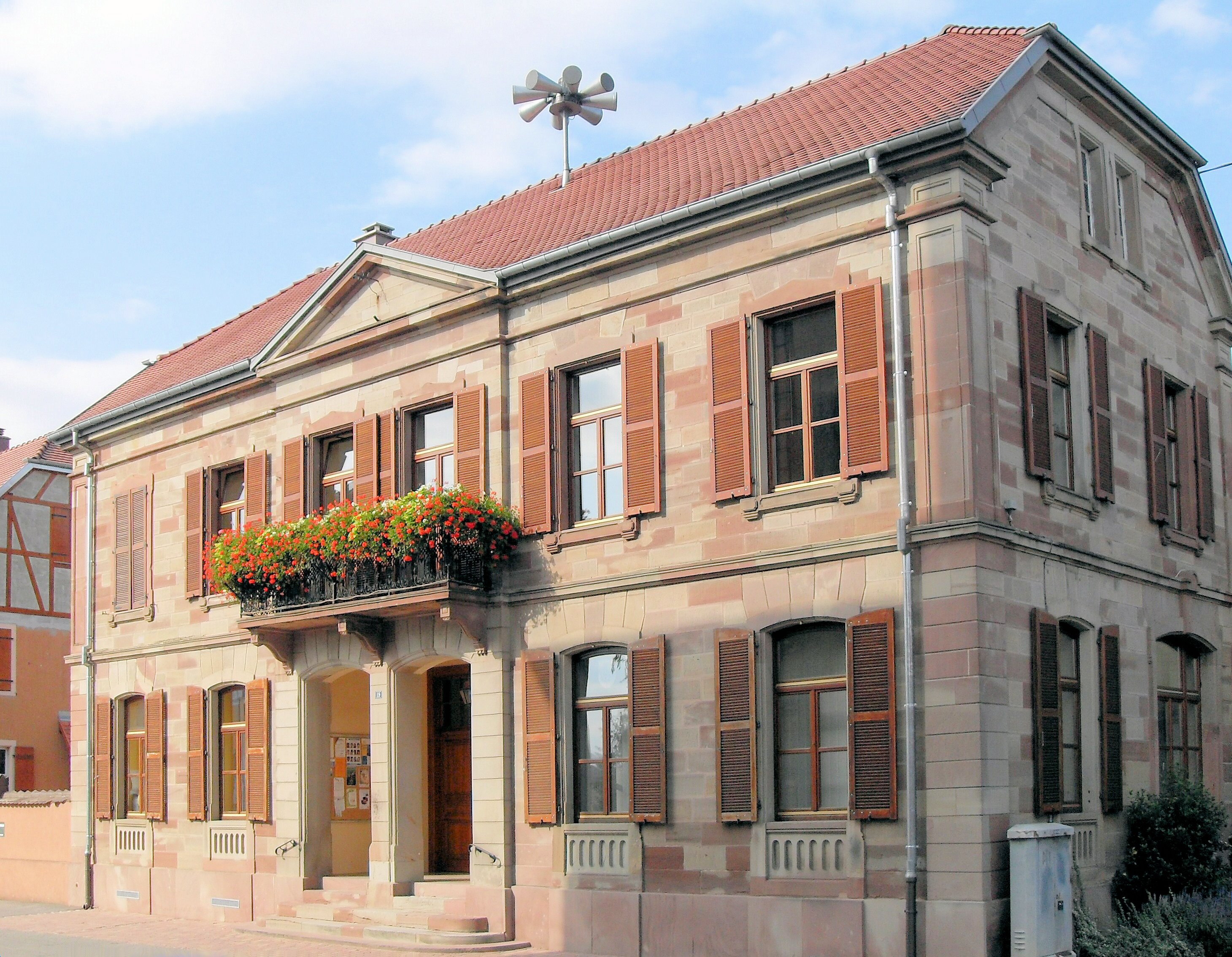 La mairie d'Artzenheim